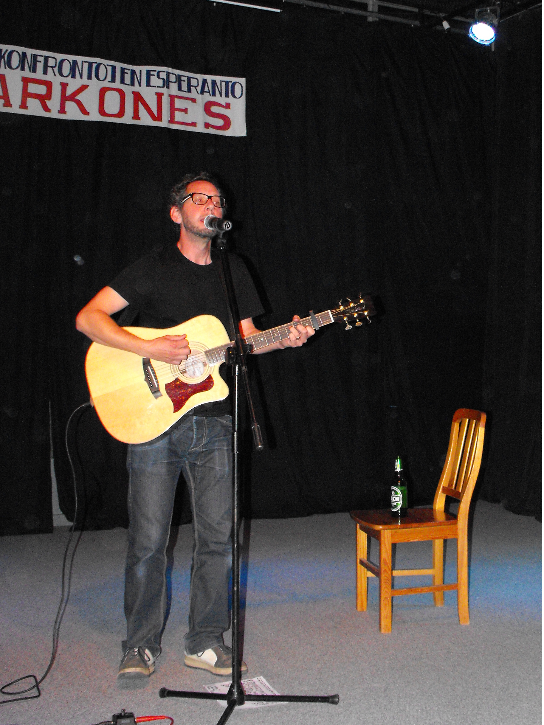 Martin Wiese dum solo-koncerto en Arkones 2009.